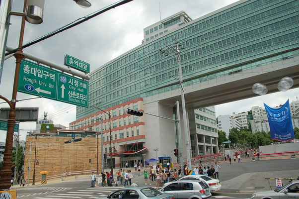 홍익대학교 정문